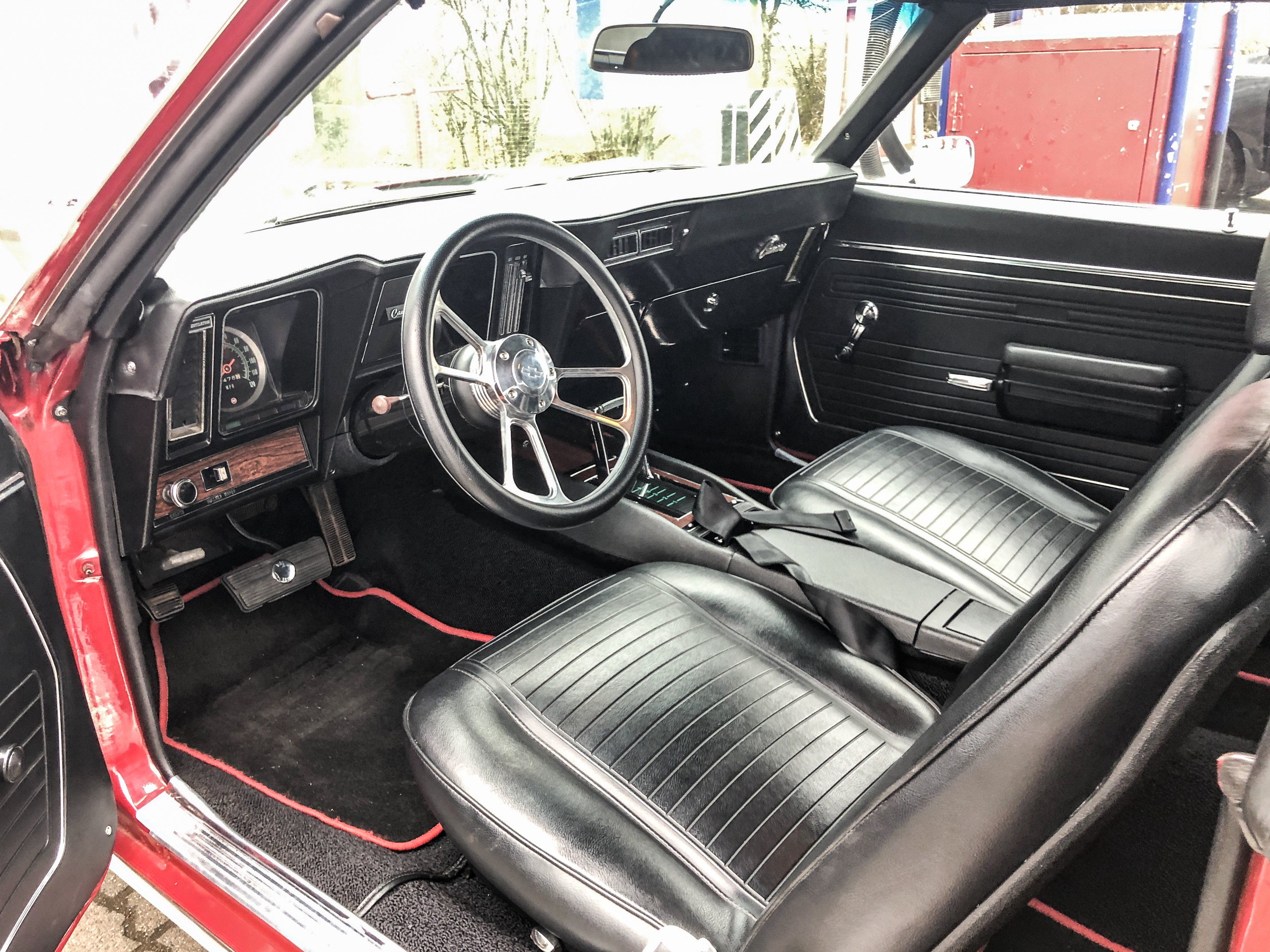 1969 Chevrolet Camaro Coupé individualisierter Innenraum (Fußmatten und Lenkrad aus Zubehör)